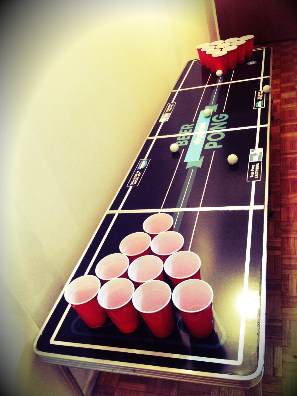 Mesa profesional para jugar Beer Pong